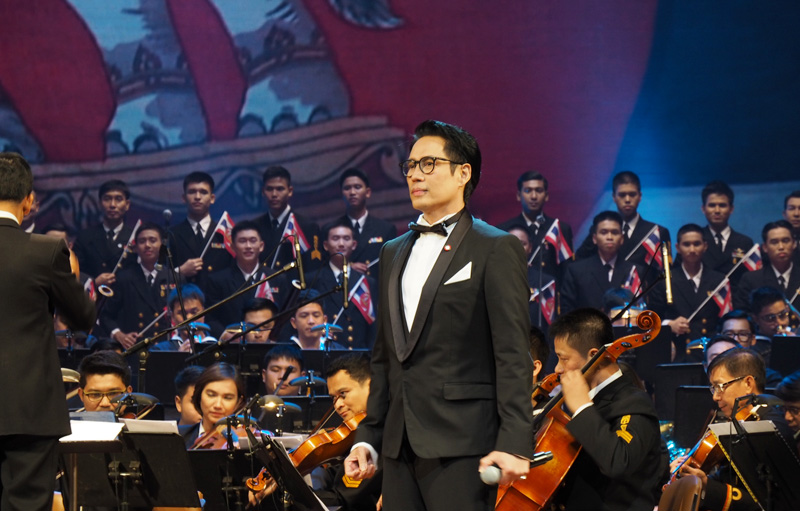 งานกาชาดคอนเสิร์ต